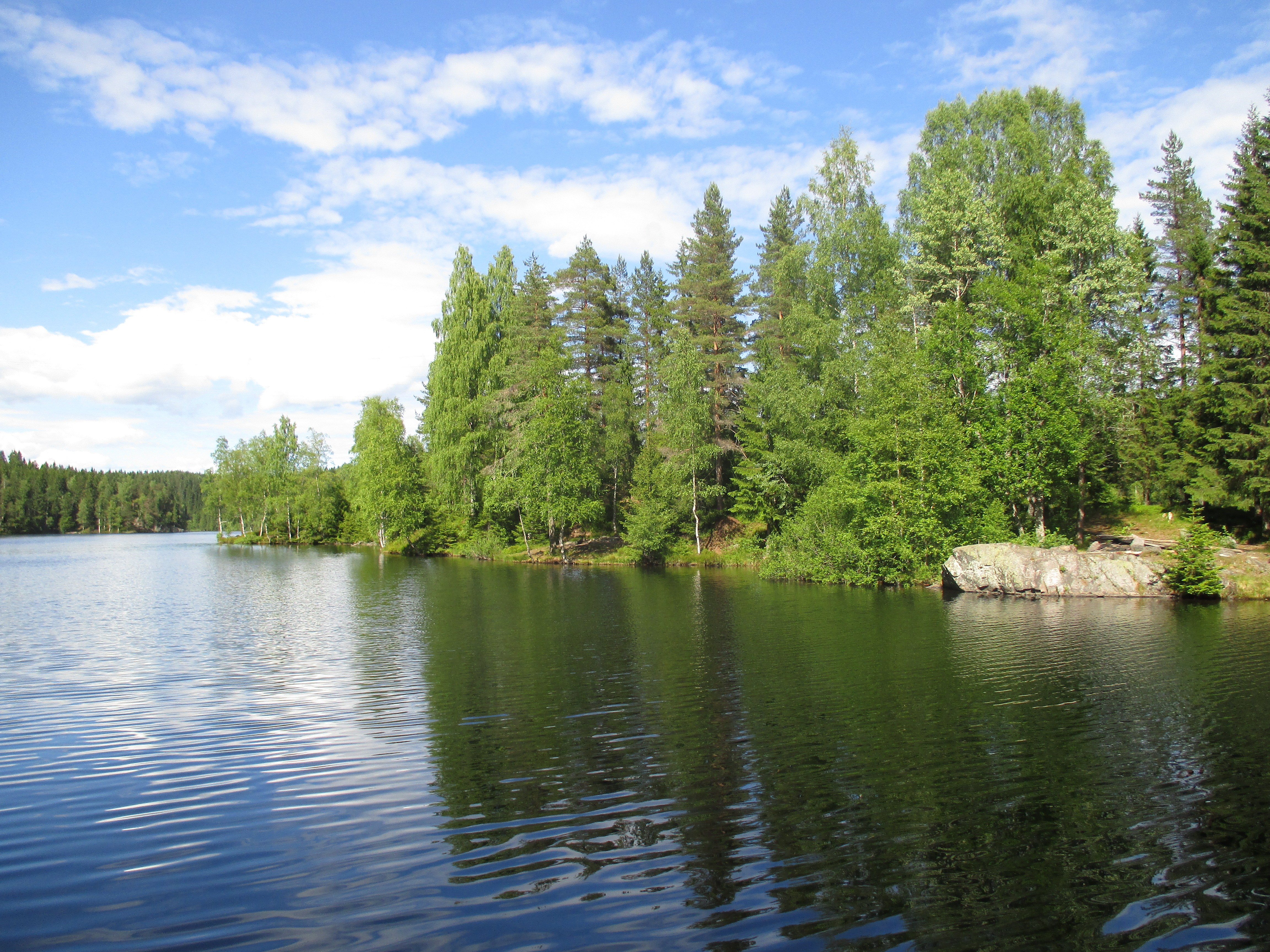 Lille Åklungen i Nordmarka